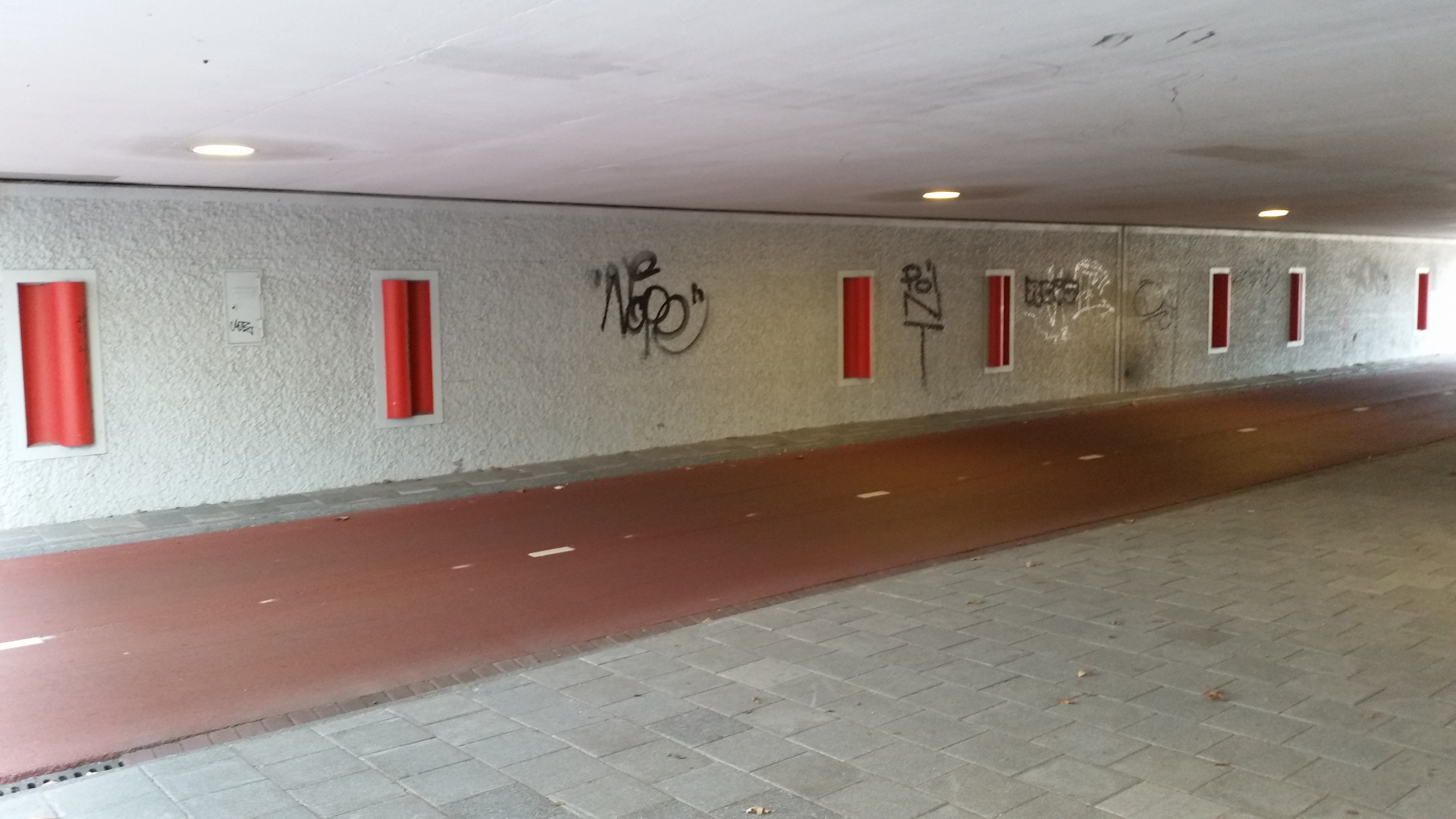 Brug 866 (in Amsterdam), doorkijk naar westen met plastieken